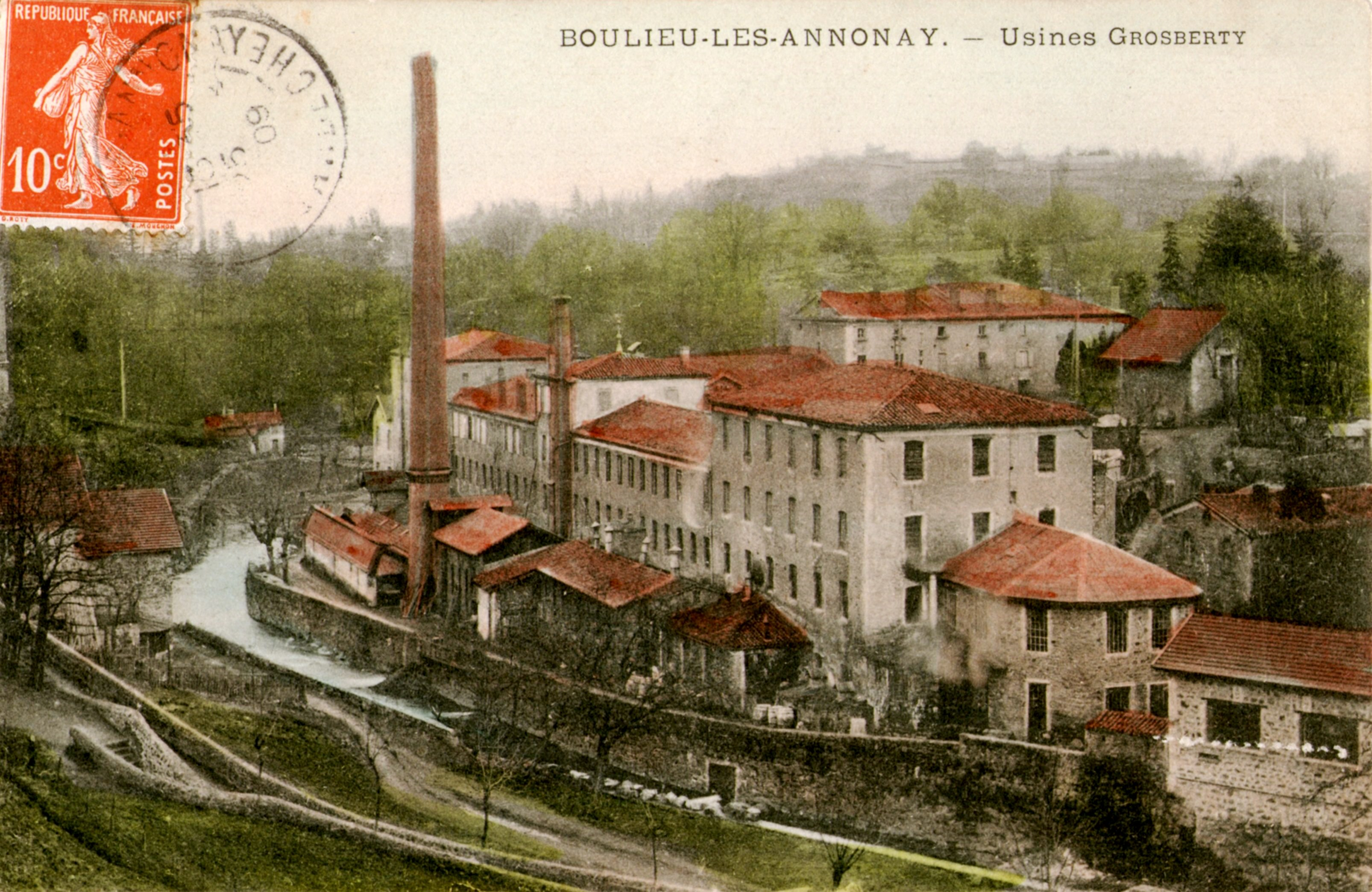 Boulieu CP Grosberty 1909